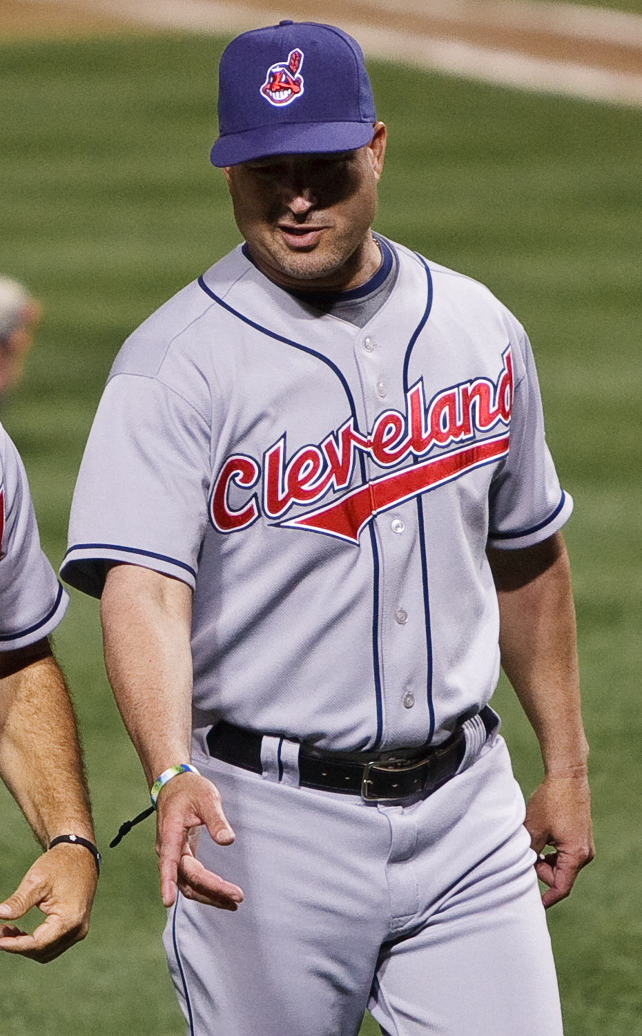 Manny Acta